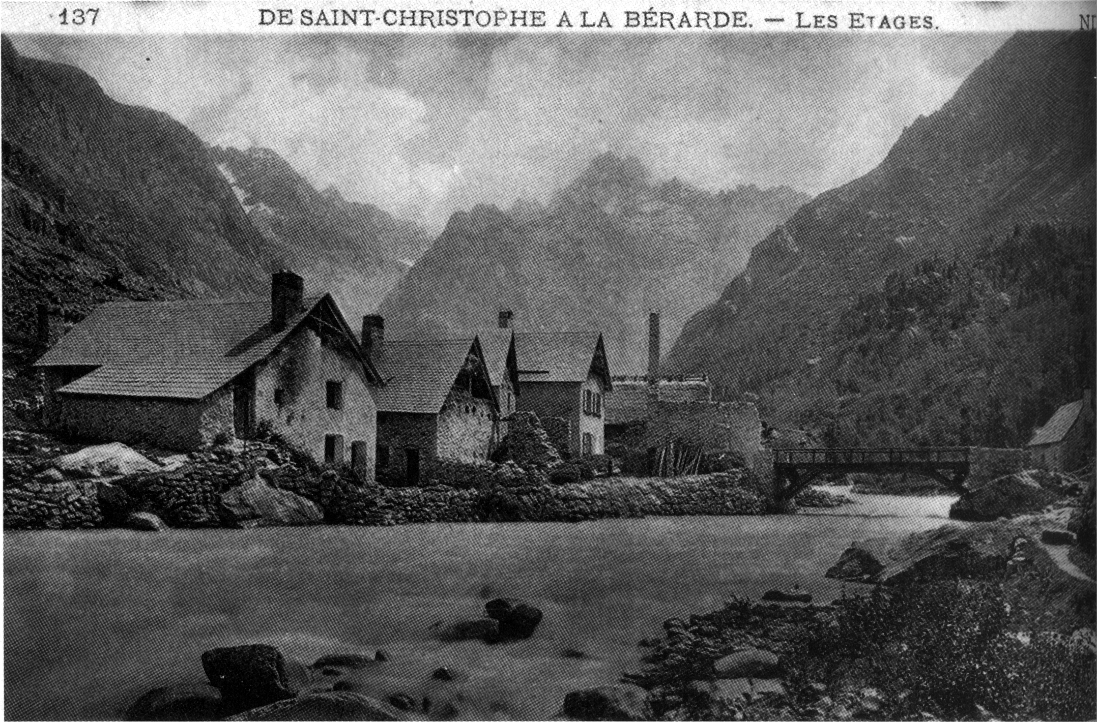 Saint-Christophe-en-Oisans, de Saint-Christophe à la Bérarde - les Etages, vers 1935